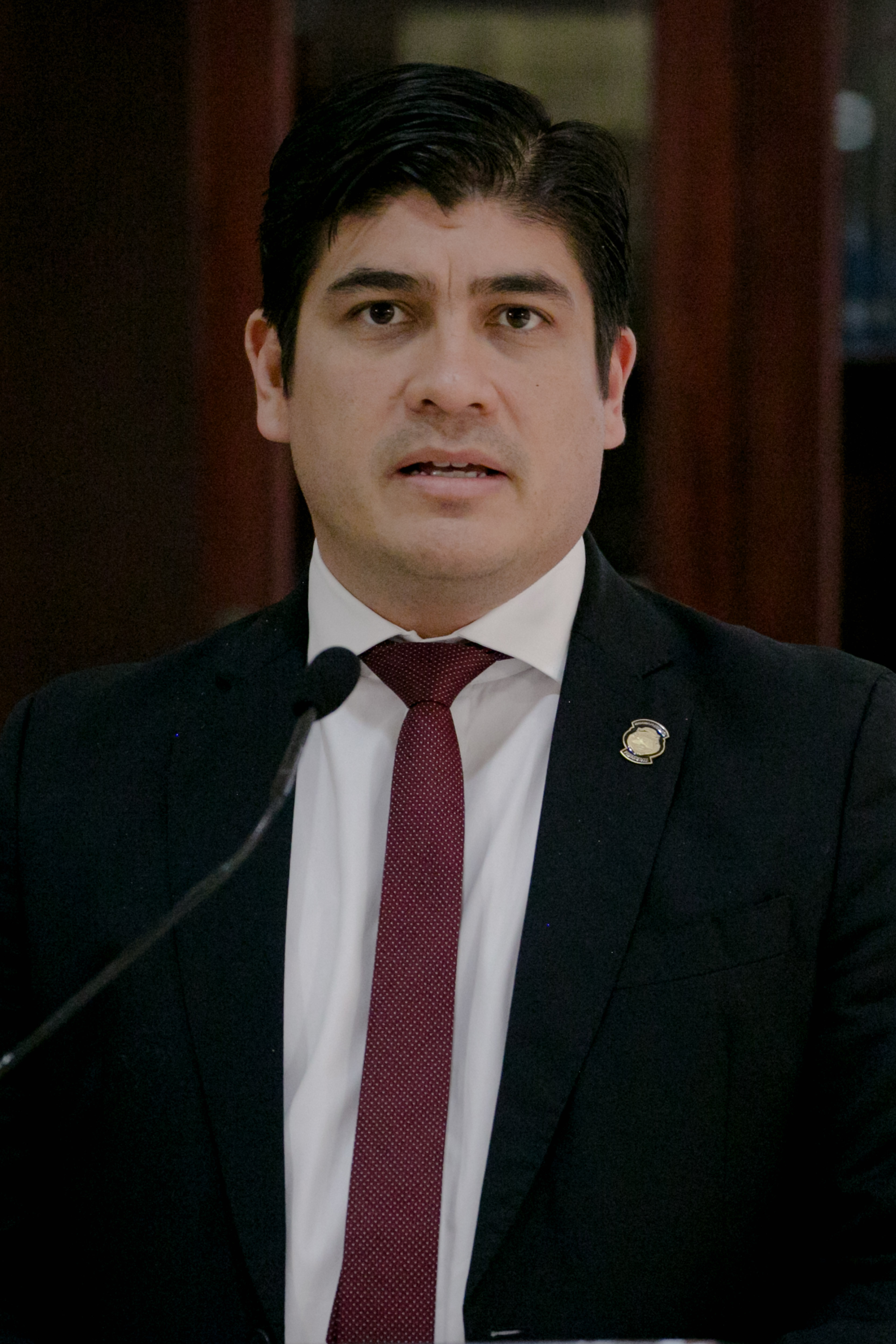 Carlos Alvarado Quesada en una conferencia de prensa en la Casa Presidencial de Costa Rica en julio del 2018.